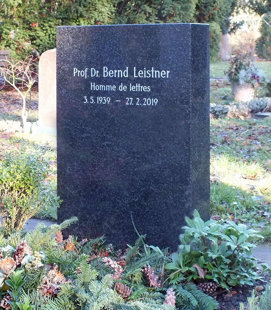 Grabstein Bernd Leistner auf dem Leipziger Südfriedhof